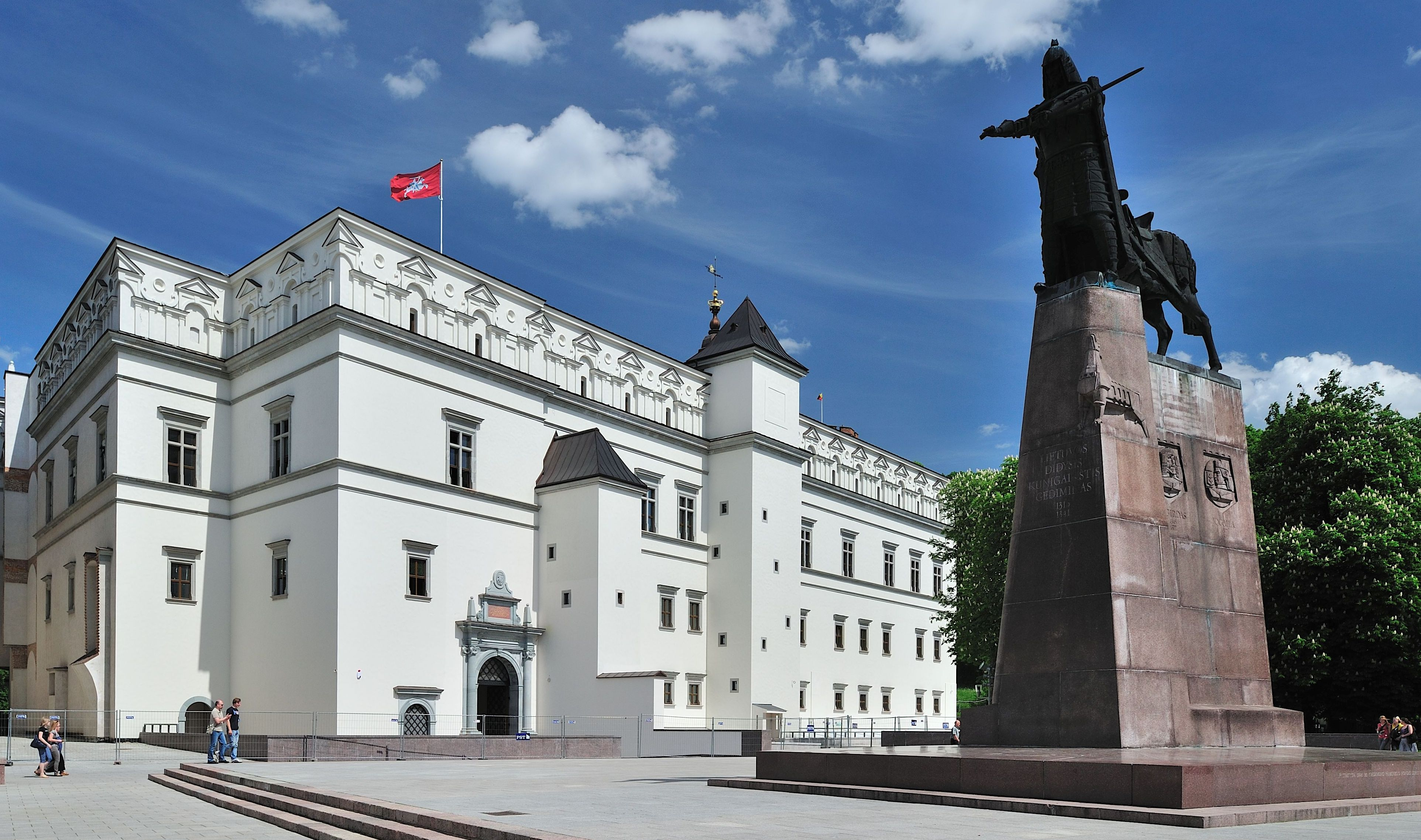 Nacionalinis muziejus Lietuvos Didžiosios Kunigaikštystės Valdovų rūmai